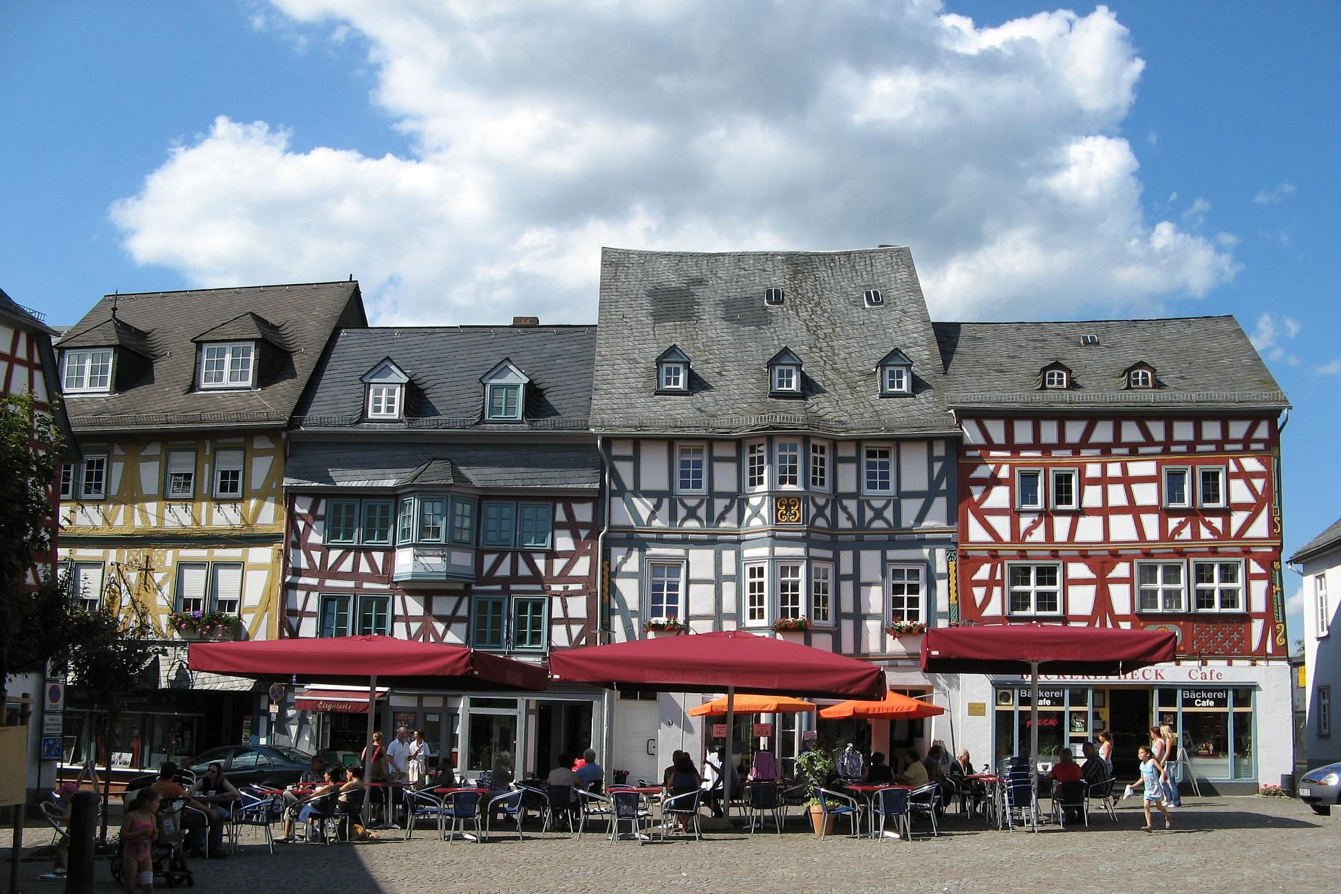 Historischer Marktplatz in Bad Camberg